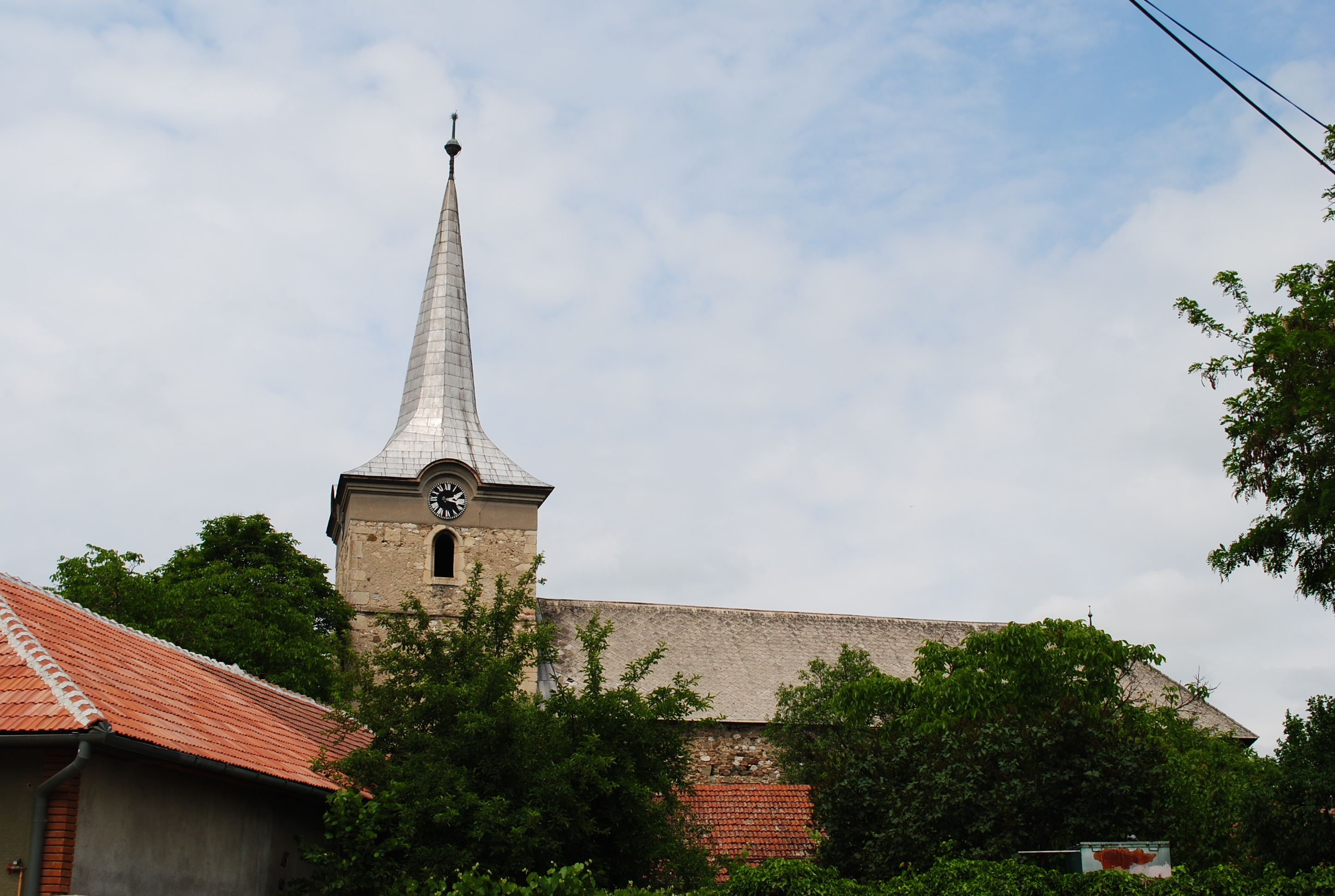 Biserică protestantă, sec. XIV - XIX